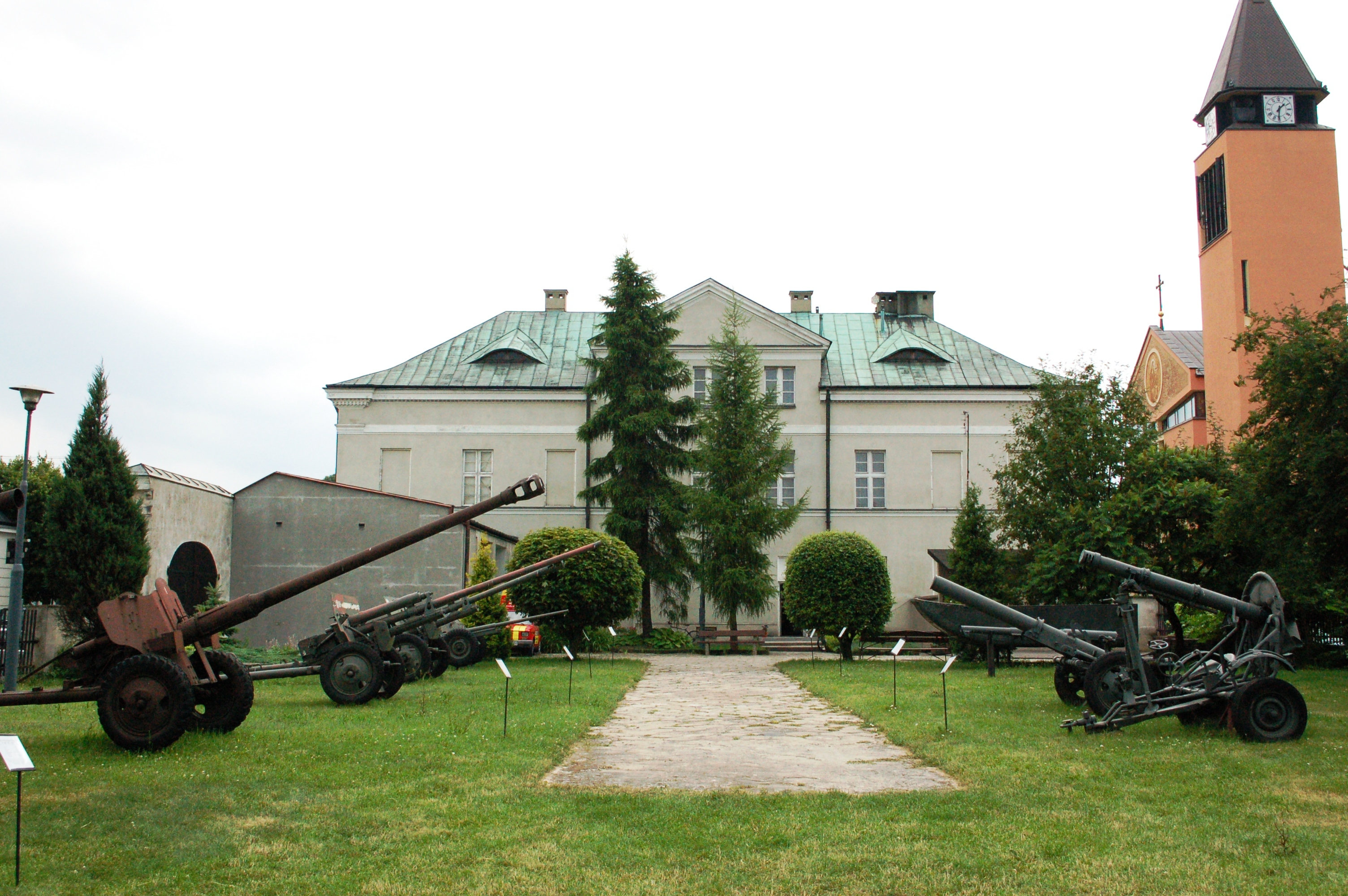 Sochaczew